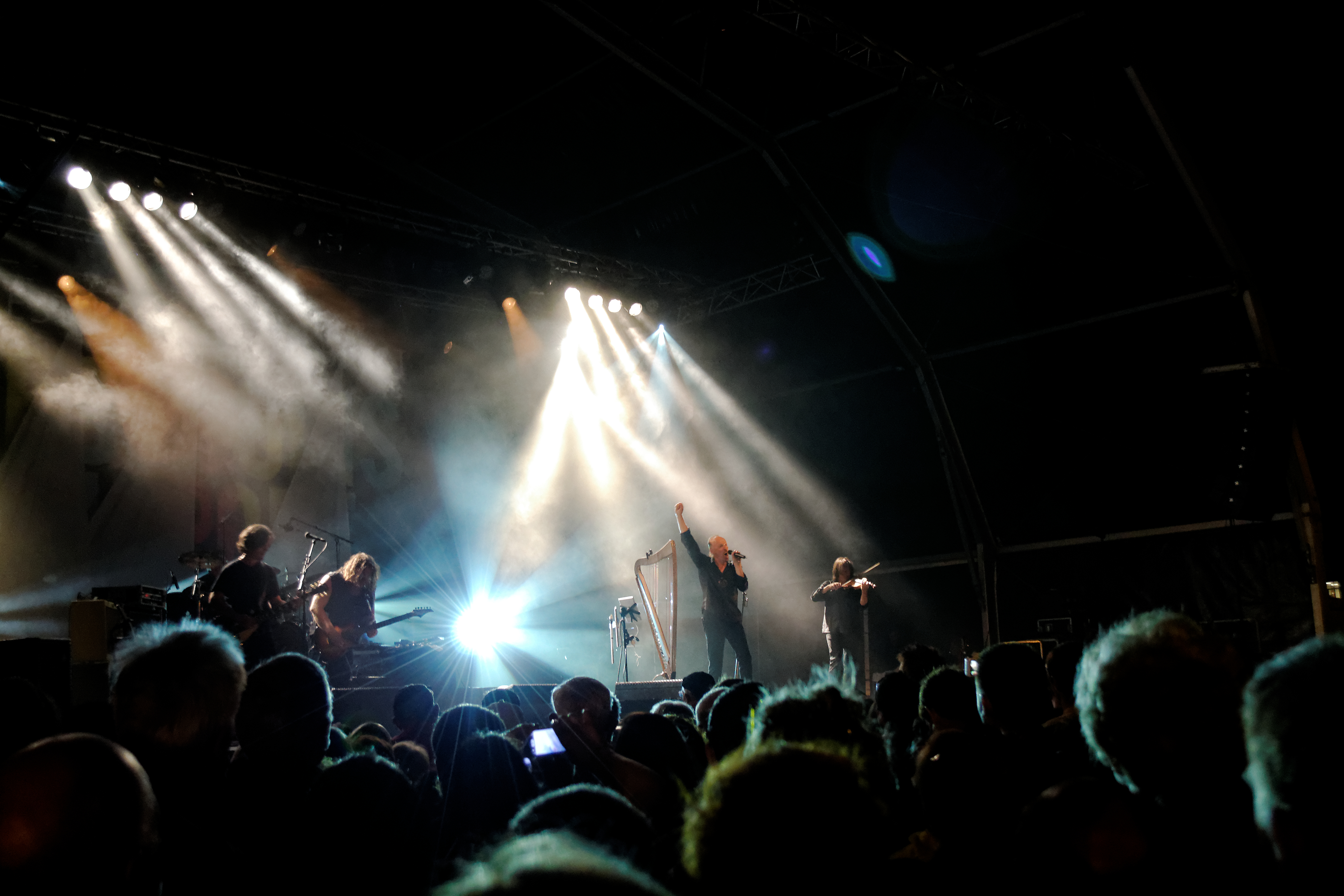 Alan Stivell en concert gratuit lors des Jeudis du port à Brest le 15 août 2013.